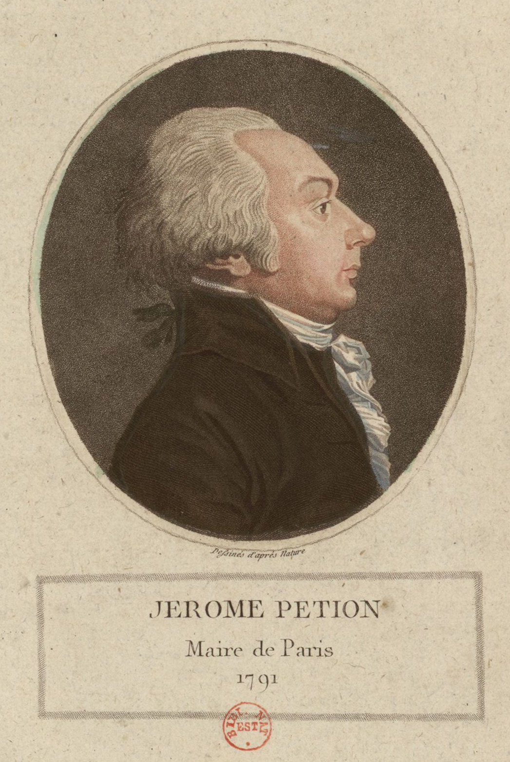 Jérôme Pétion, maire de Paris, 1791 (estampe, eau-forte, aquatinte, pointillé, couleurs).